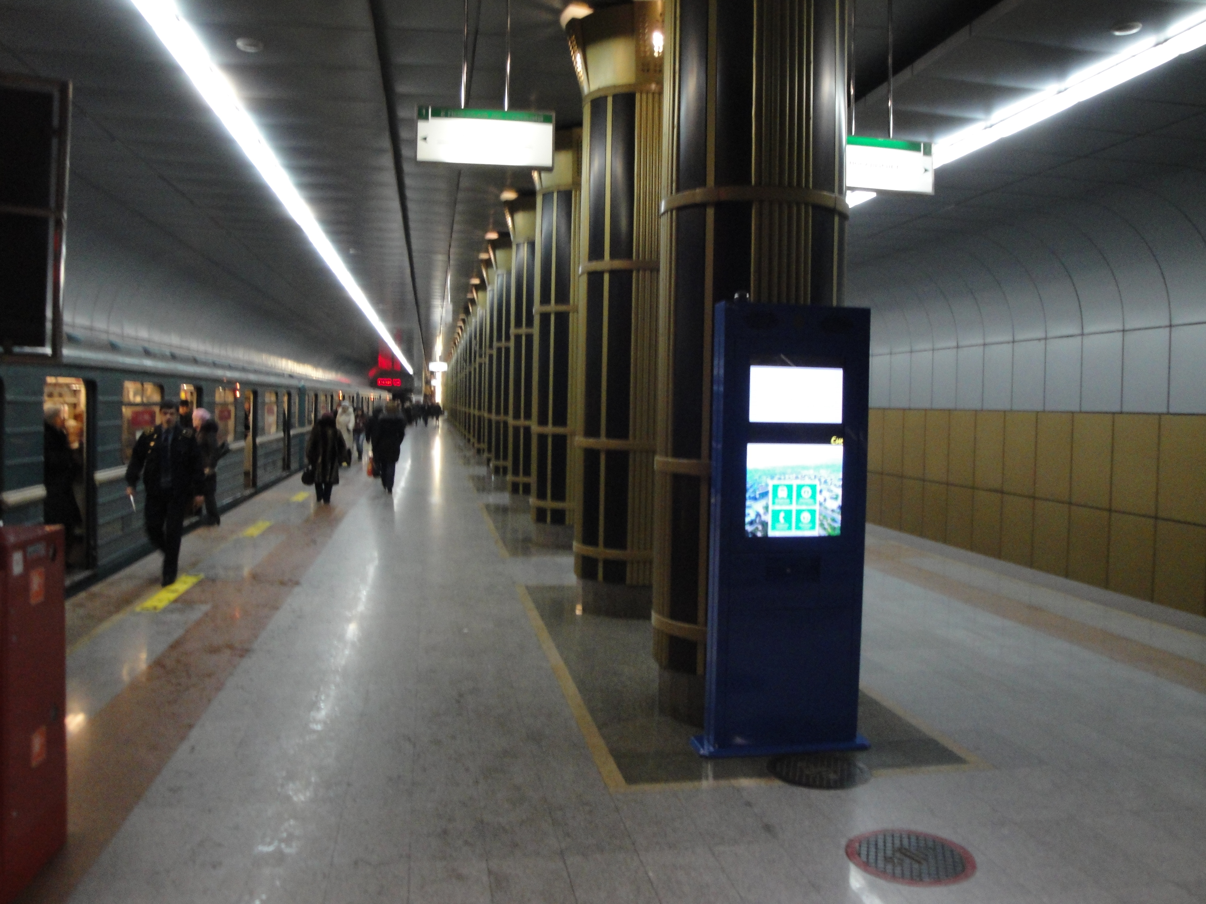 Станция "Золотая Нива". Платформенный участок.